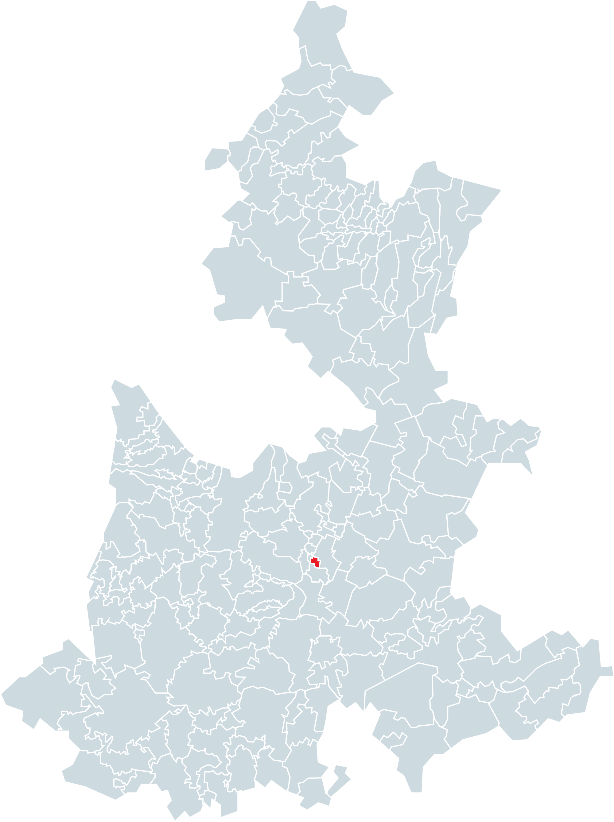 Municipio de Tepeyahualco de Cuauhtémoc